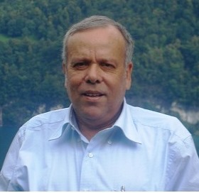 תמונתו של הסופר משה רבפוגל